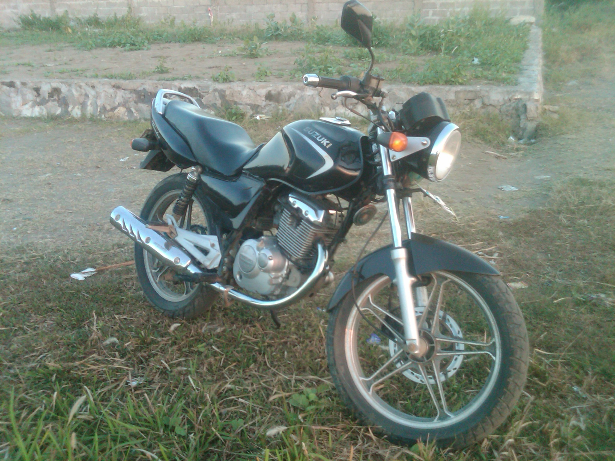 Suzuki Thunder 125